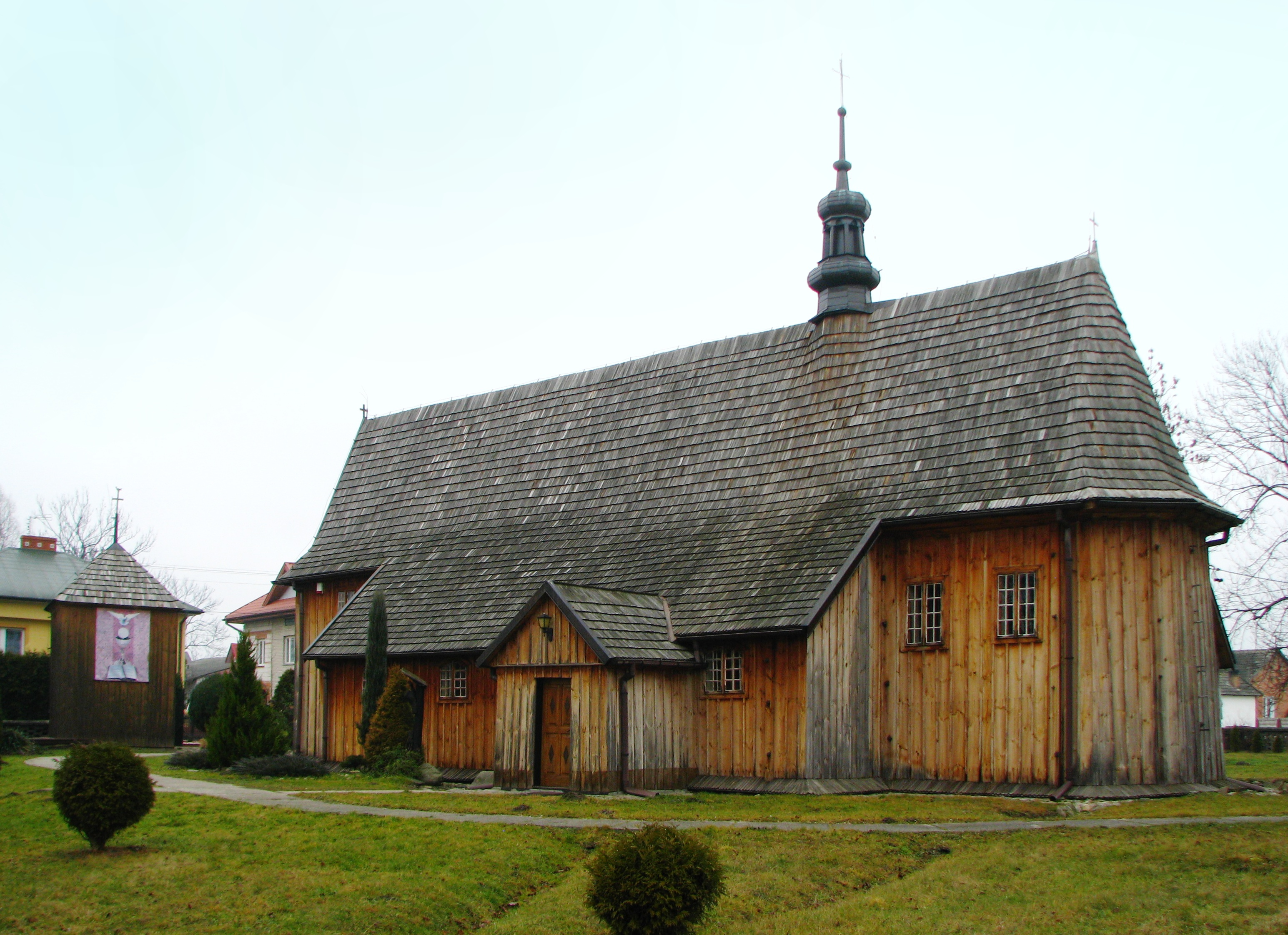 Strzegom, kościół par. pw. Matki Boskiej Bolesnej i św. Andrzeja Apostoła, XVI/XVII w., 1925 r.